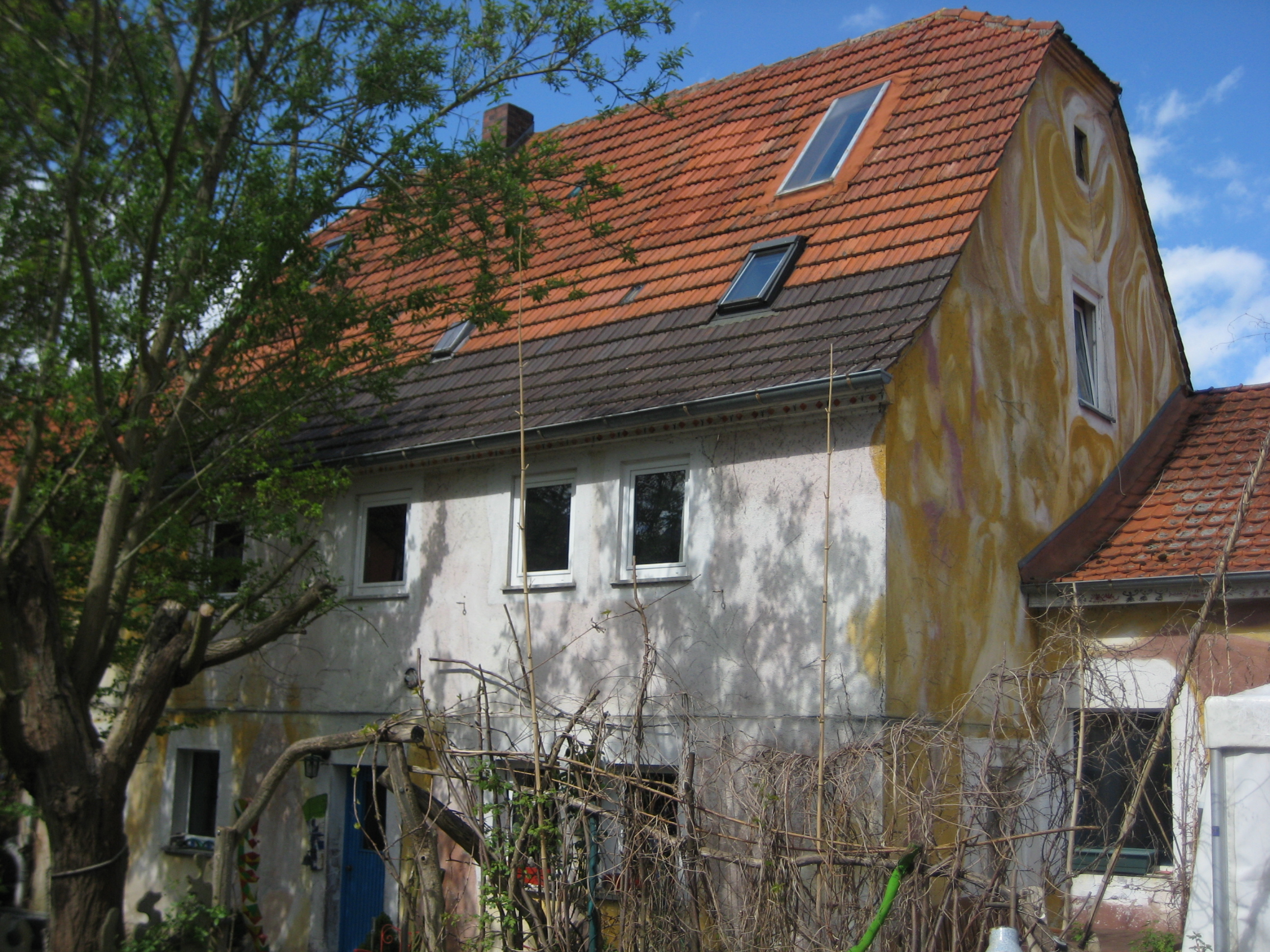 Ehemaliges Gasthaus "Zur Linde" (Kist), wohl 17./18. Jahrhundert